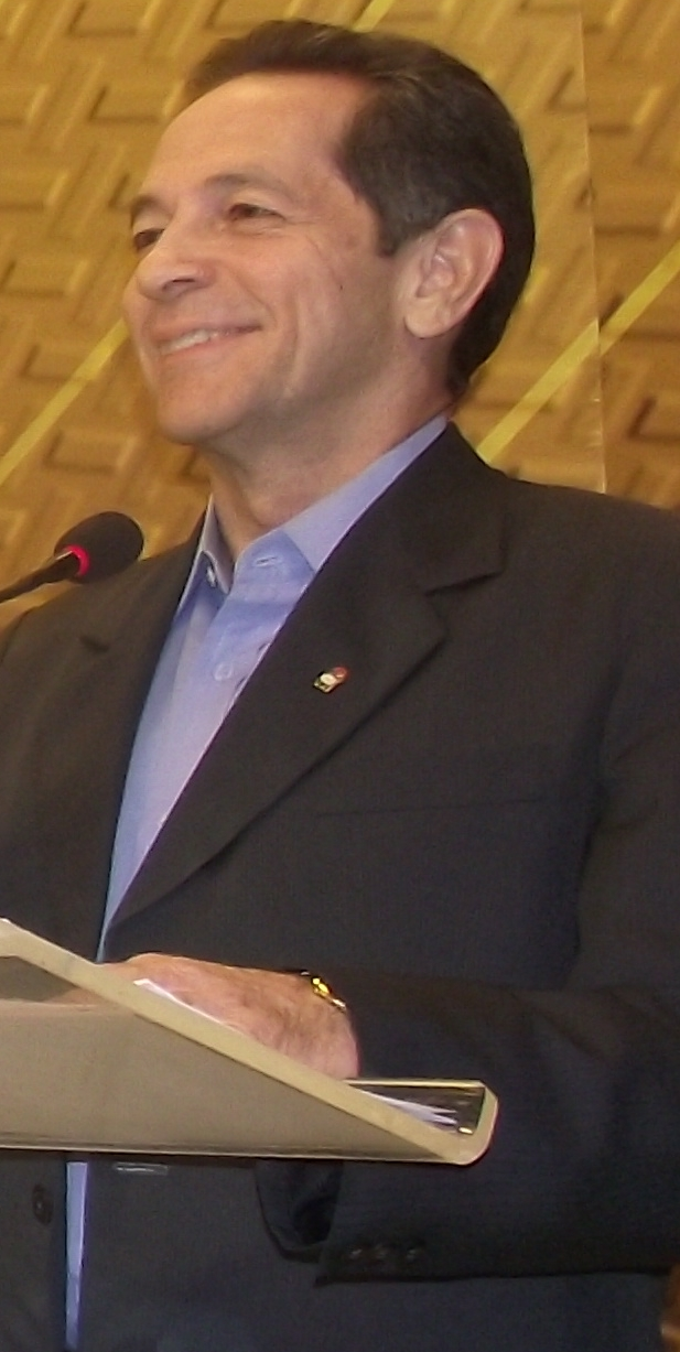 Heitor Ferrer em um debate da emissora jangadeiro, filiada da Rede Globo